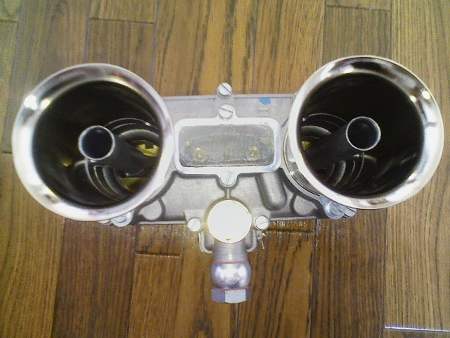 Weber 48IDA carburetor Venturis